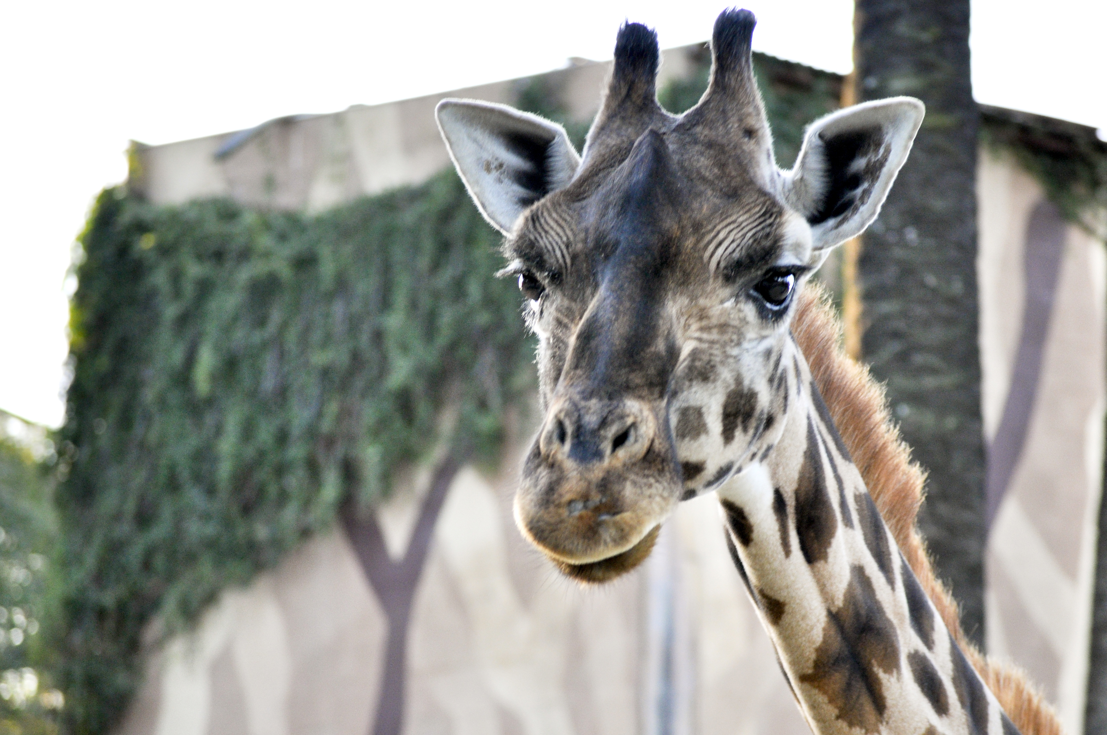 Girafa en zoo de Jerez